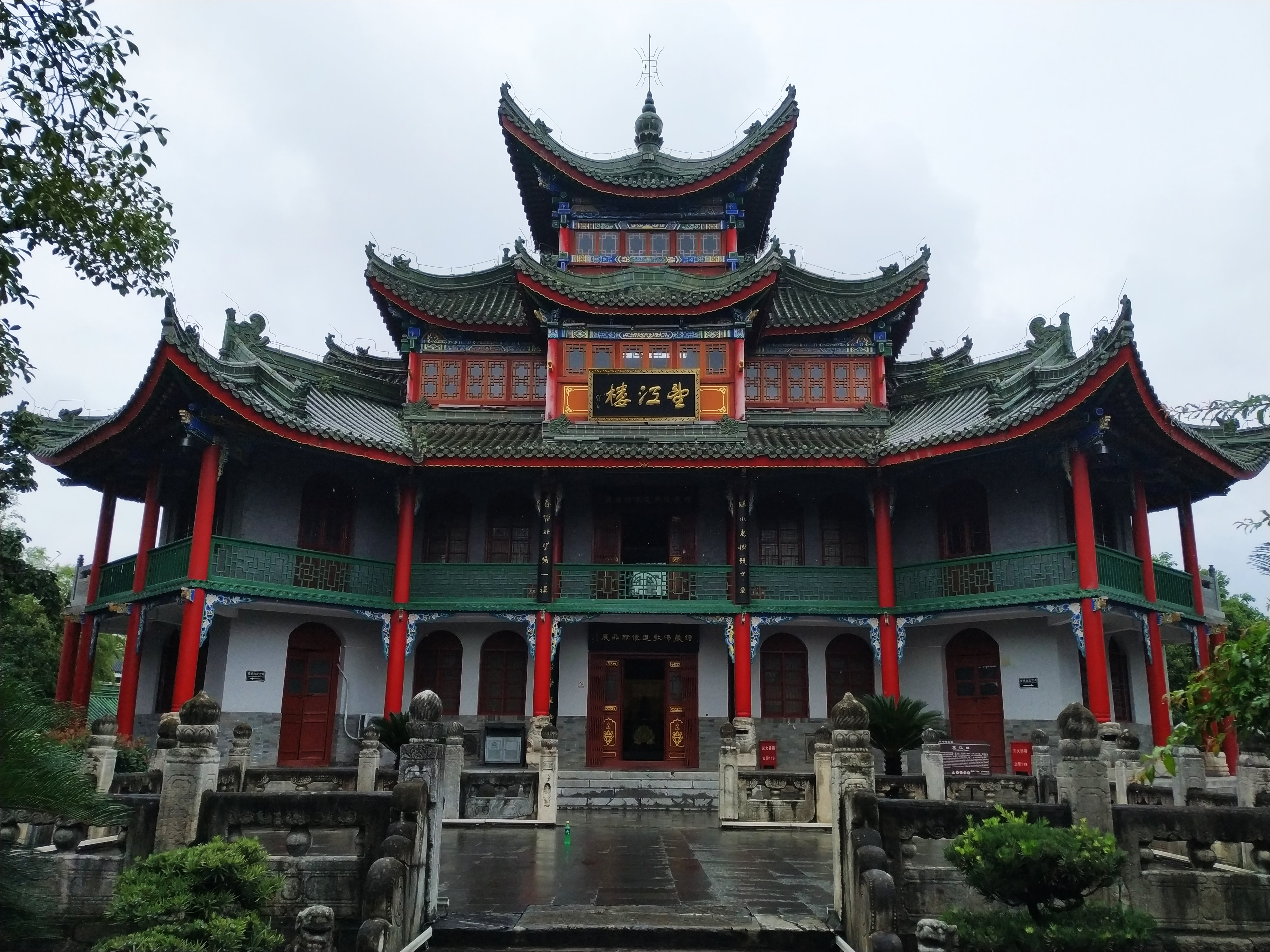 中文（中国大陆）: 古汉台望江楼